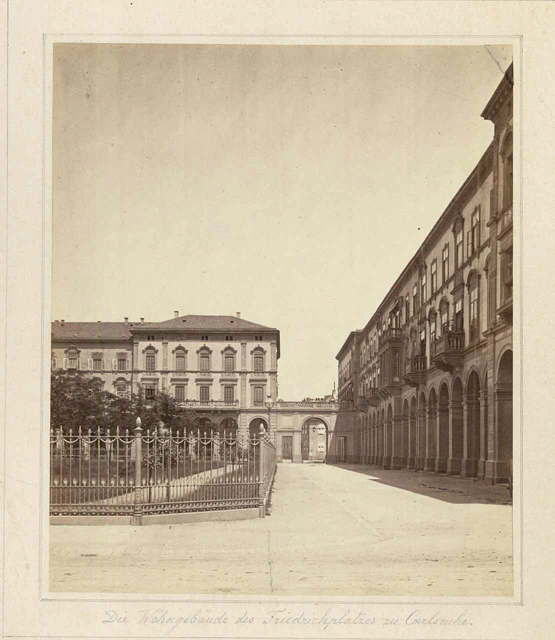 Die Wohngebäude des Friedrichsplatzes zu Carlsruhe. Albuminabzug, 1868. 18,5 x 15,5 cm. Mit Widmung "Seiner lieben Nichte Hermine von Ihrem Onkel Berckmüller dem Erbauer dieser Wohnhäuser. August 1868"